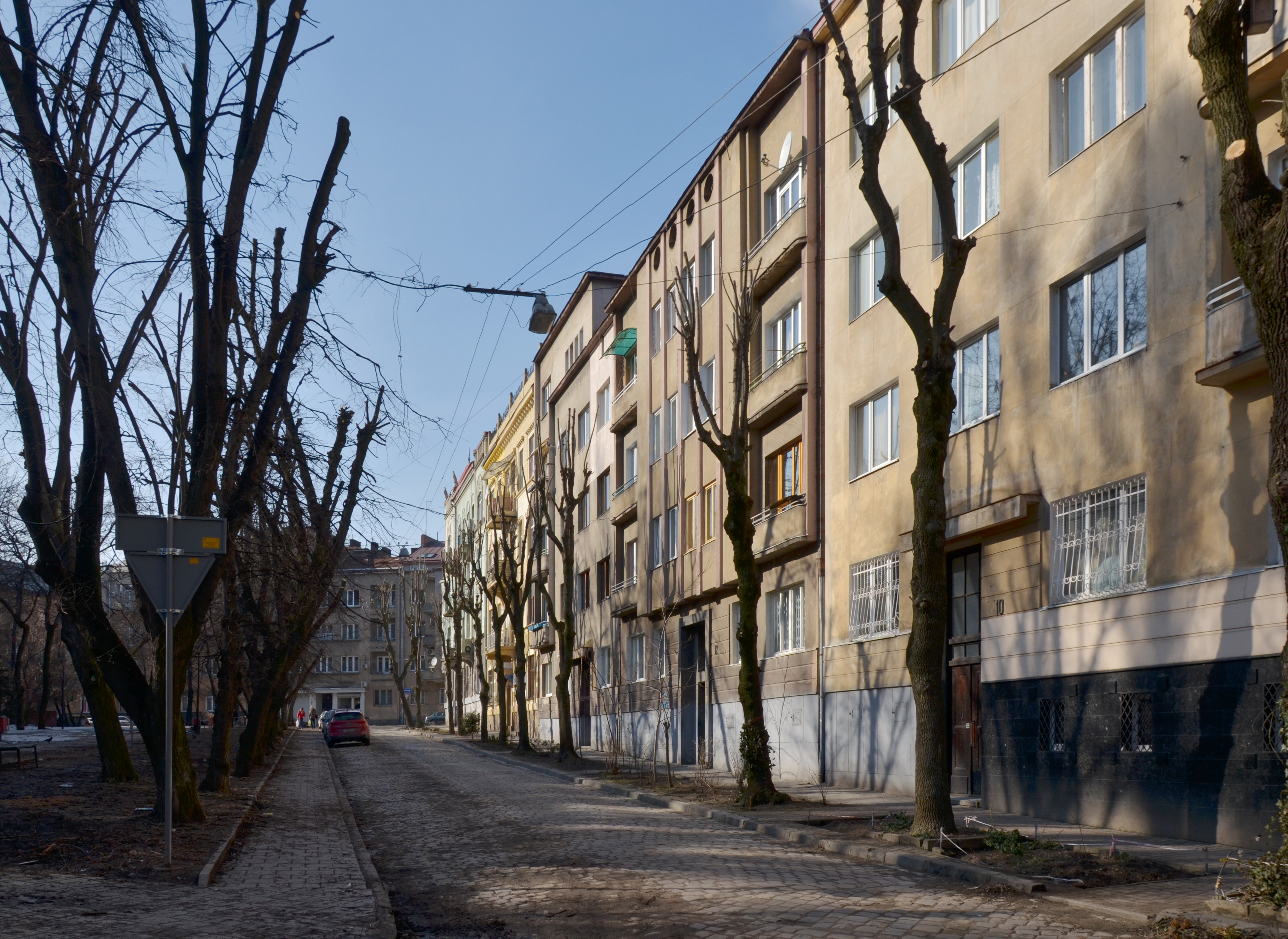 Вулиця Японська у Львові.